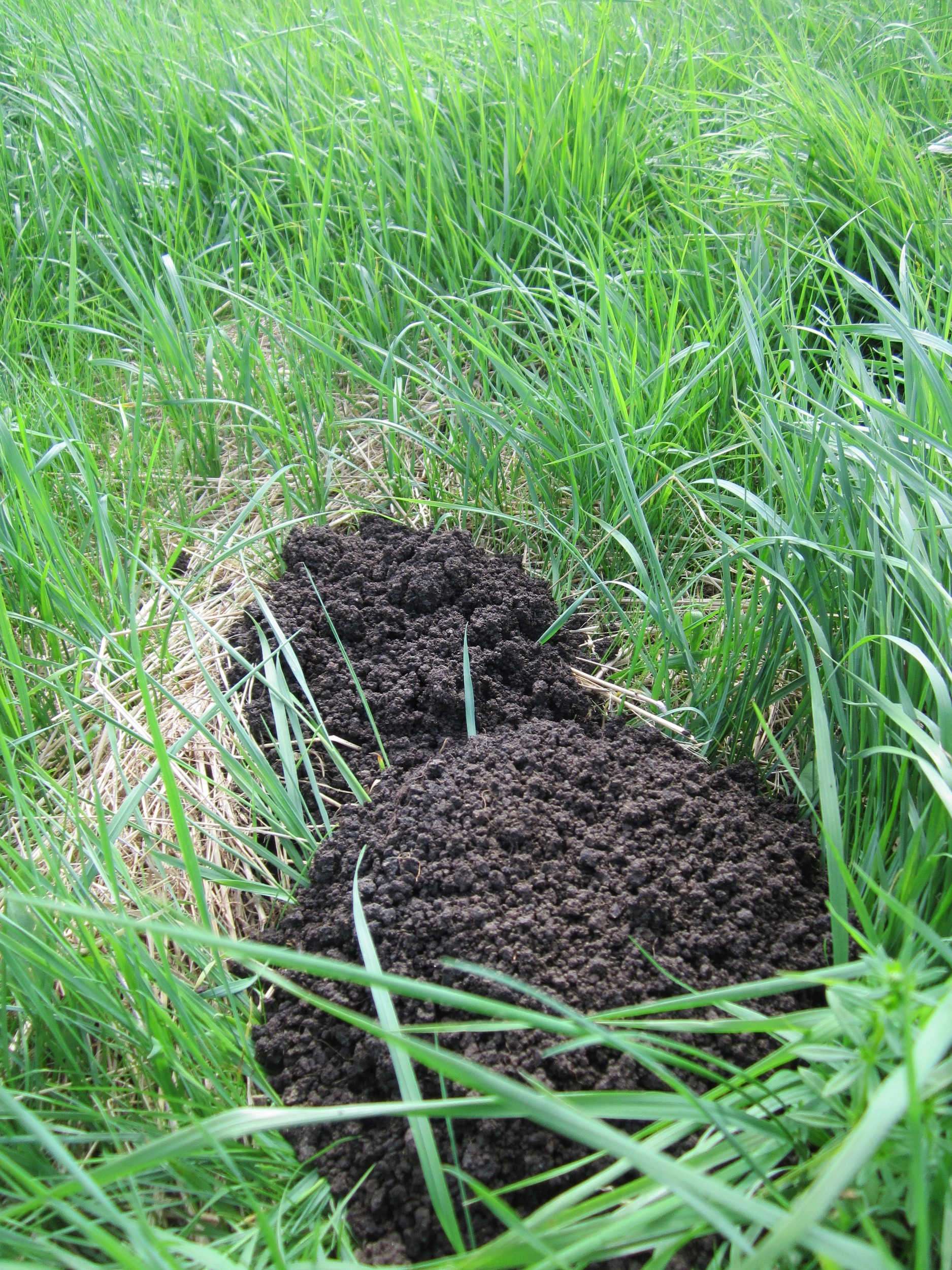 Maulwurfshügel auf dem Niedermoor Fröschau bei Reilingen. Nur durch Maulwürfe wird der Anmoorboden zu Tage gefördert.